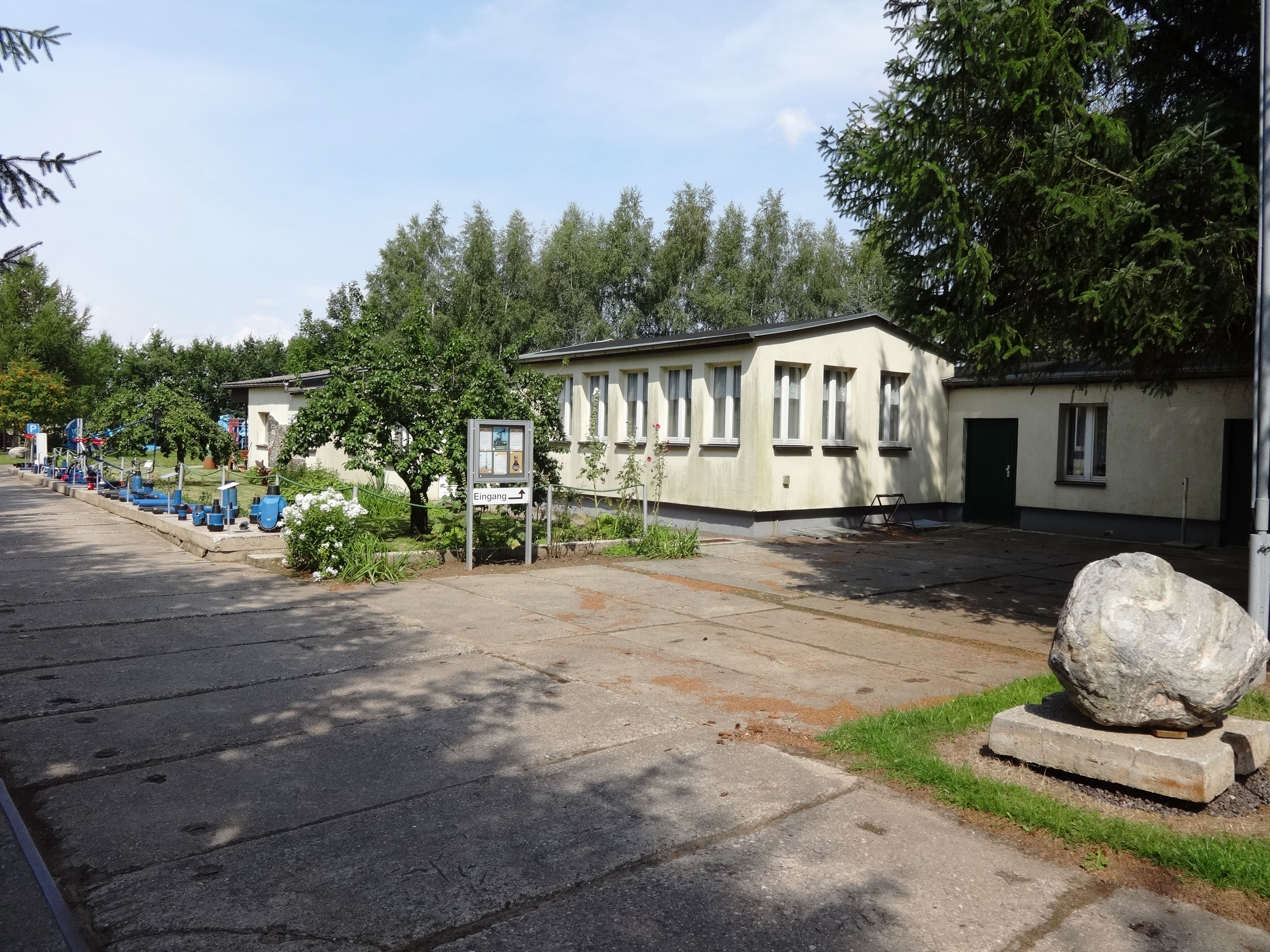 Erdölmuseum und Heimatstube in Reinkenhagen, Gemeinde Sundhagen in Mecklenburg-Vorpommern Der Raum um Grimmen und Reinkenhagen war von 1961 bis 1996 eines der größten norddeutschen Erdölfördergebiete auf dem Gebiet der DDR. Das Museum beschreibt die technischen Vorgänge, die Erdölförderung und ist am Standort der ersten erdölfündigen Bohrung Reinkenhagen 2/2a/60 eingerichtet. Eine Erdölstraße mit Exponaten führt von Miltzow aus zum Mueseum.